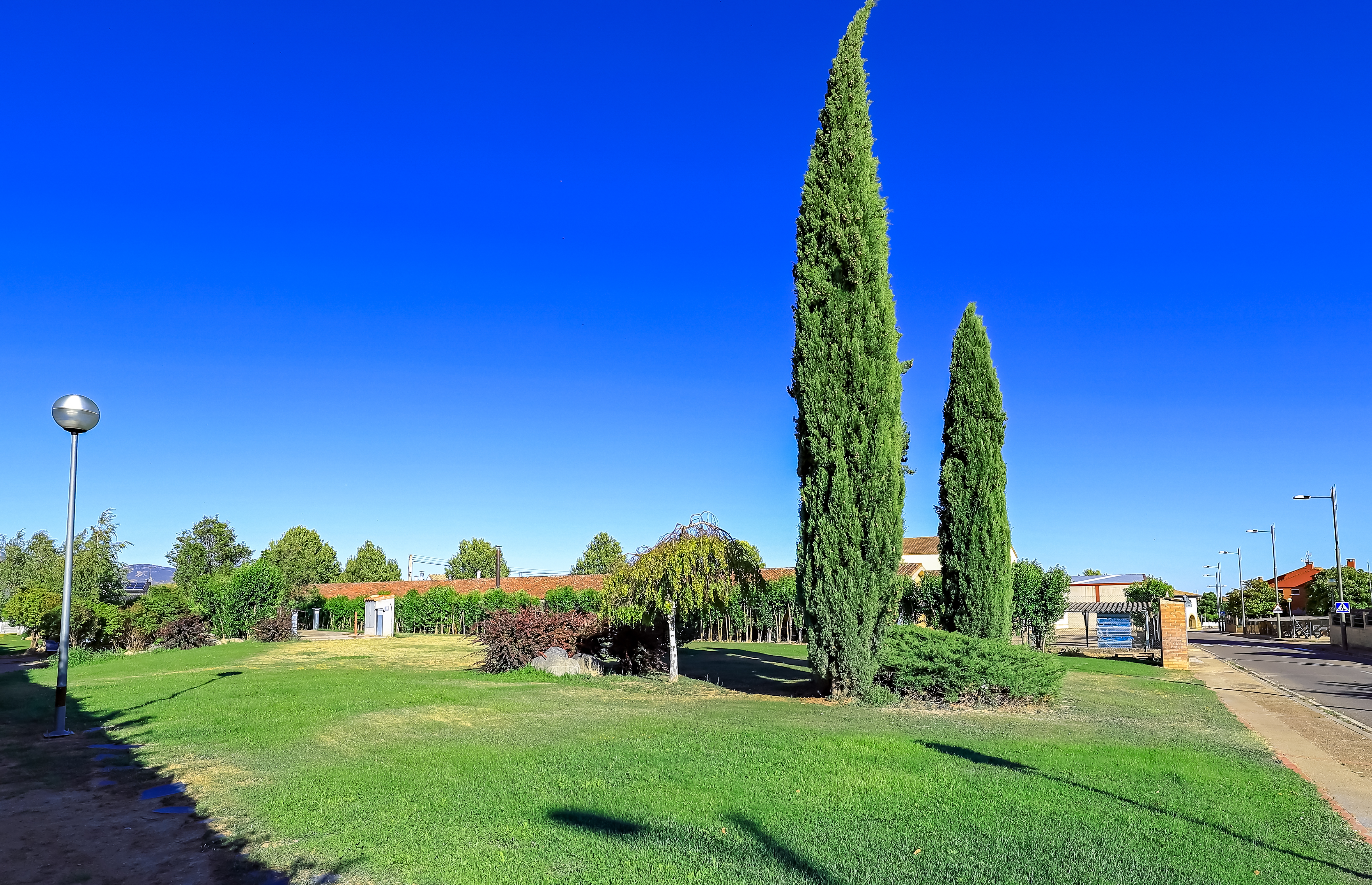 Banastás es un municipio de la comarca Hoya de Huesca, en la provincia de Huesca.